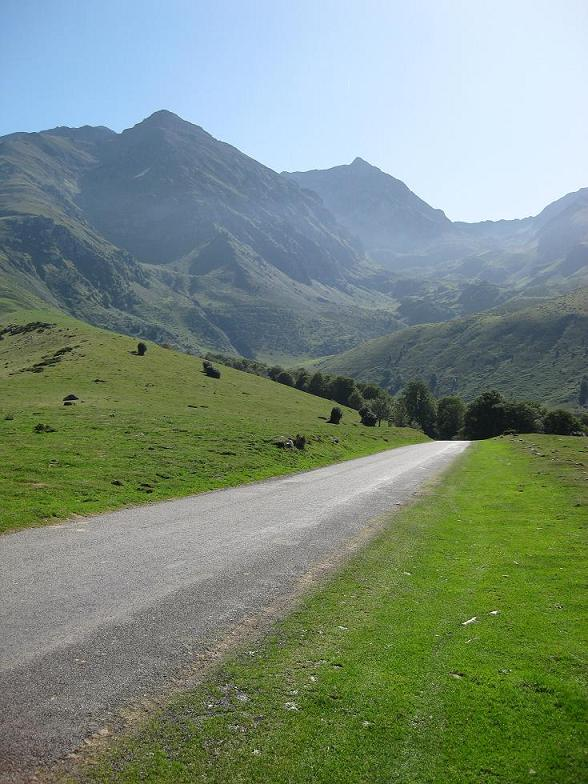 Vue du sommet - vers le Nord